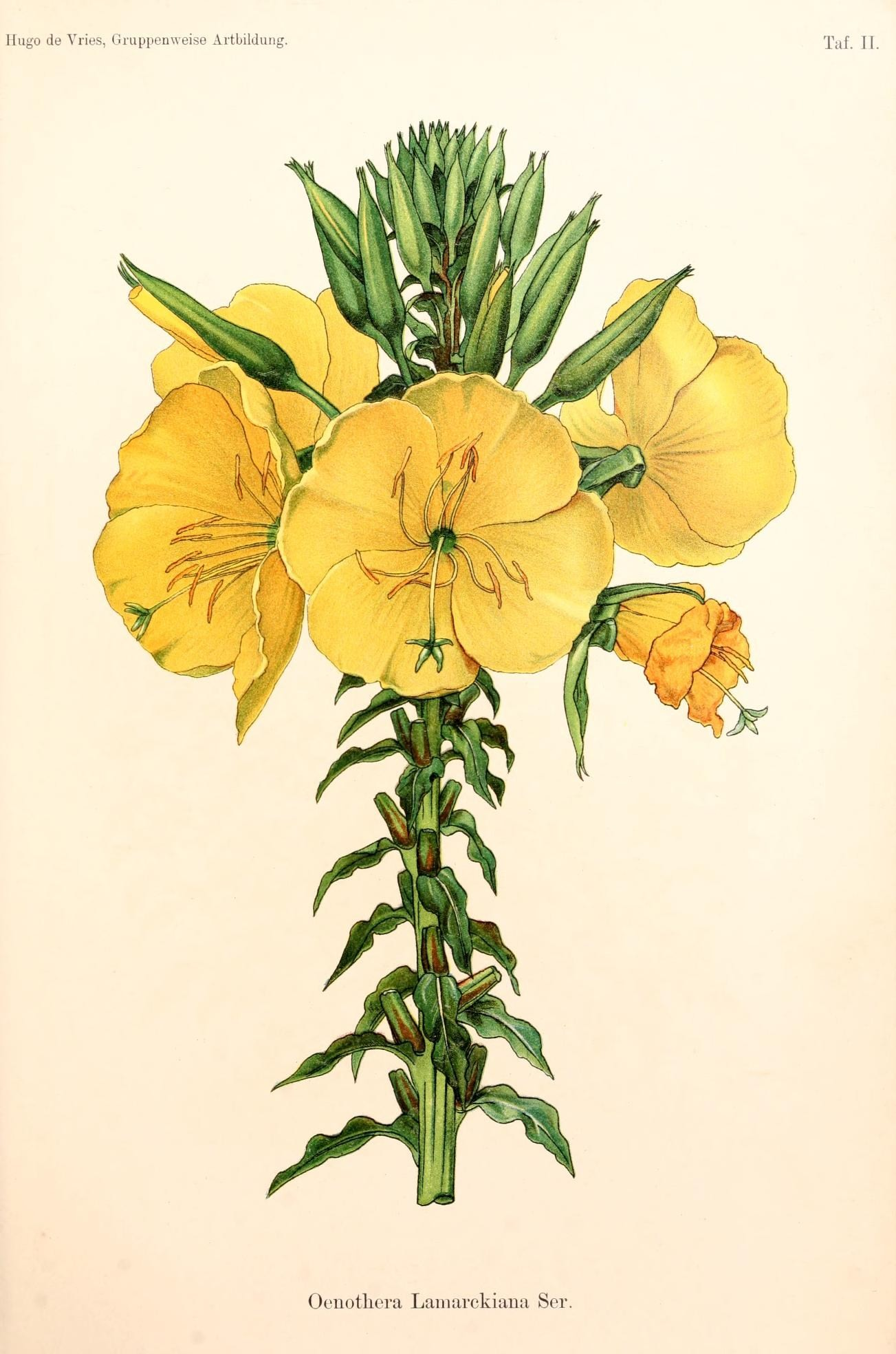 Hugo de Vries, Gruppenweise Artbildung. Taf. IT. Oenothera Lamarckiana Ser.